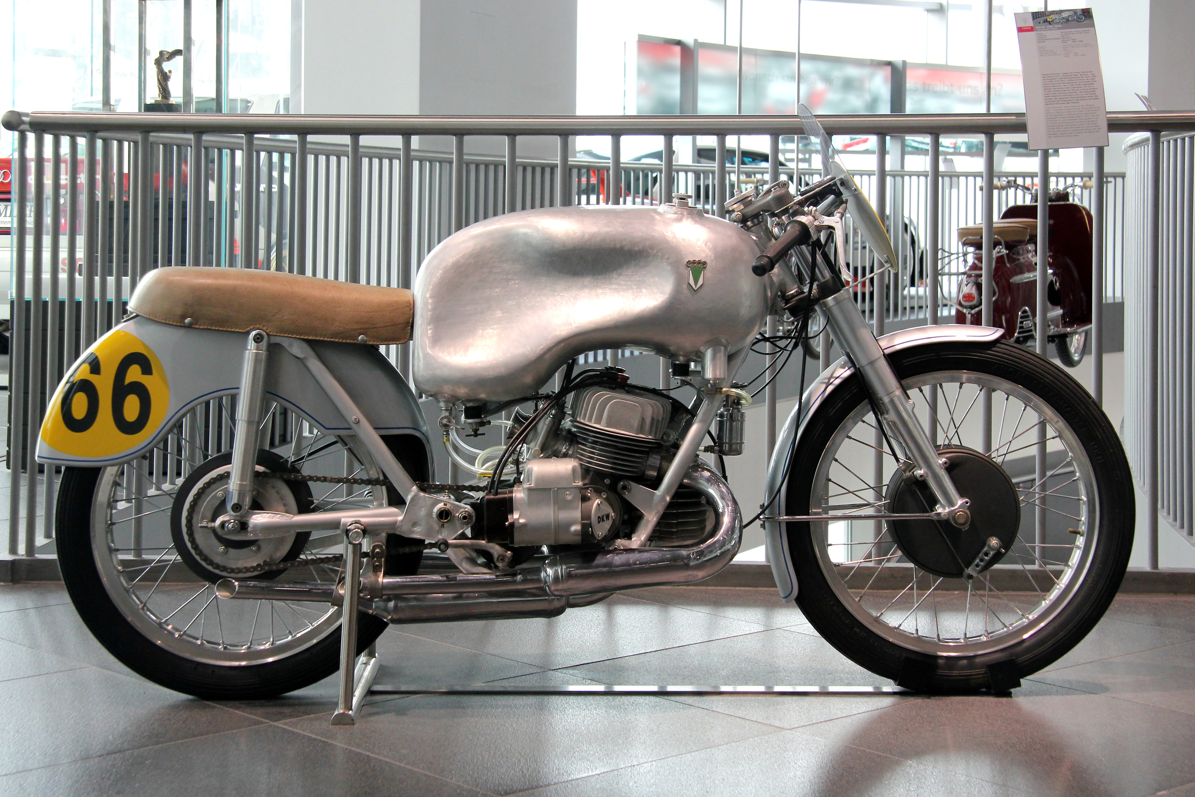 DKW RM 350, Baujahr 1953, im museum mobile in Ingolstadt. 3-Zylinder-Zweitaktmotor, 350 cm³, 38 PS bei 12.000/min, Höchstgeschwindigkeit 190 km/h. Im Einsatz von 1952 bis 1956. Bekannt als „Singende Säge“